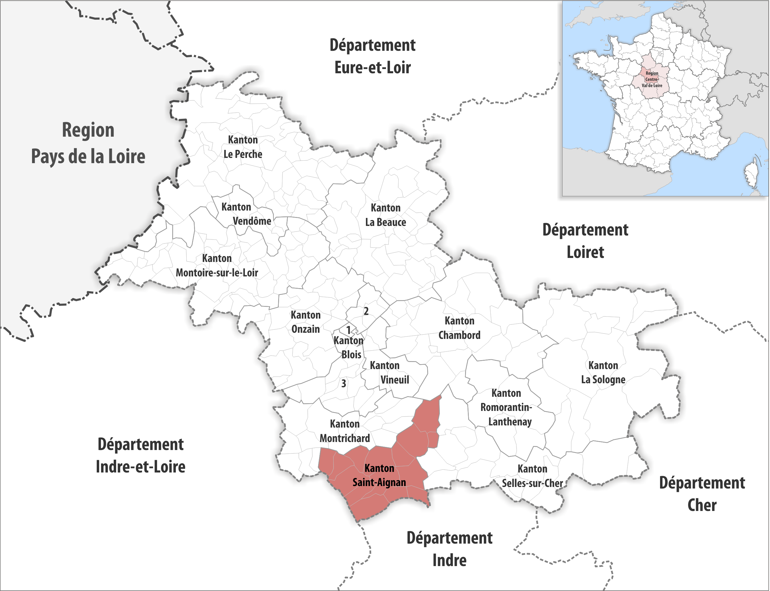 Lage des Kantons Saint-Aignan